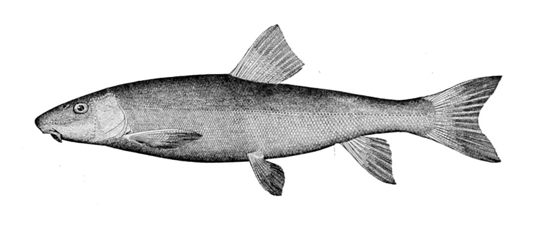 Catostomus catostomus catostomus